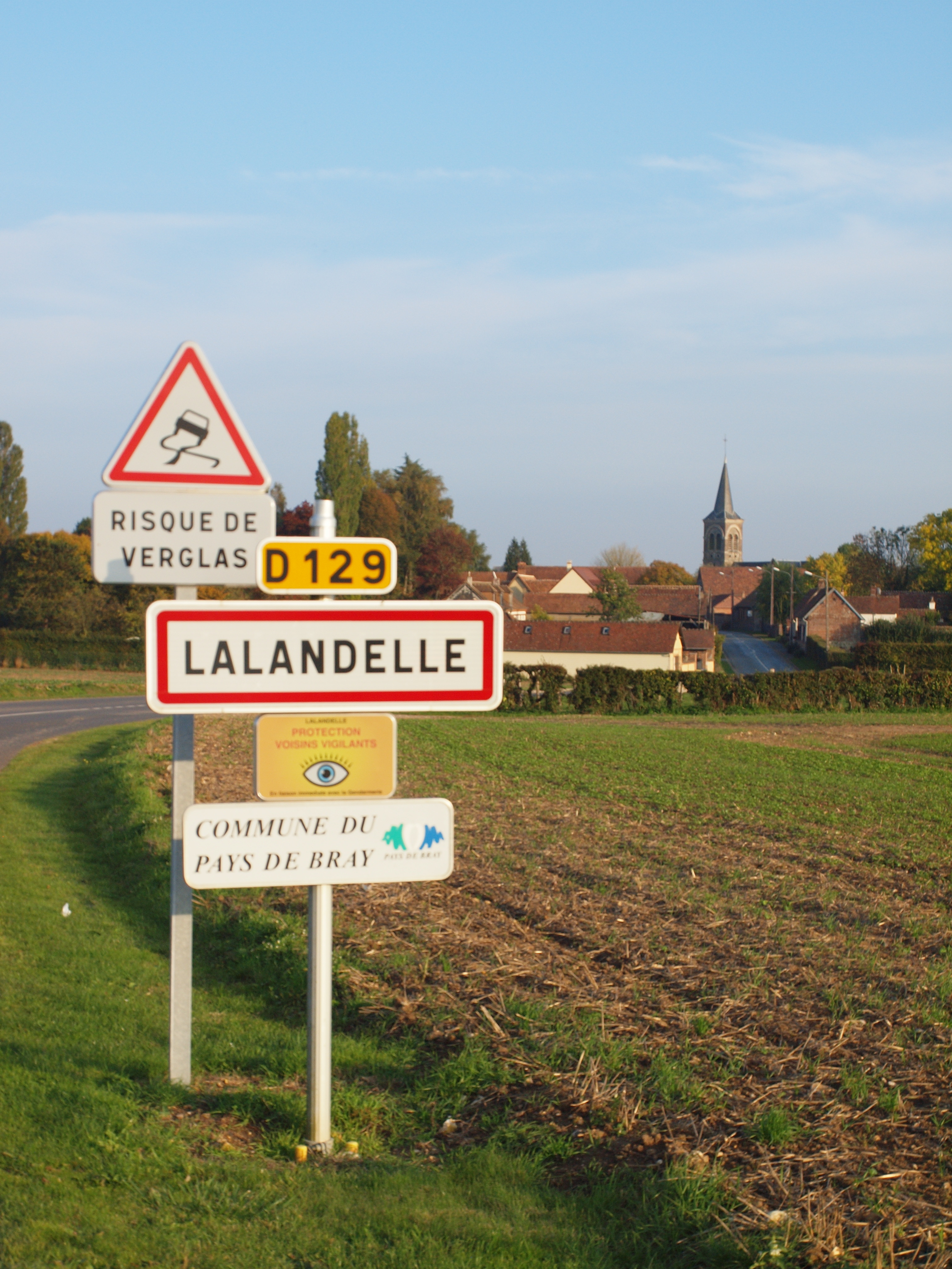 Lalandelle (Oise, France) , panneau d'agglomération